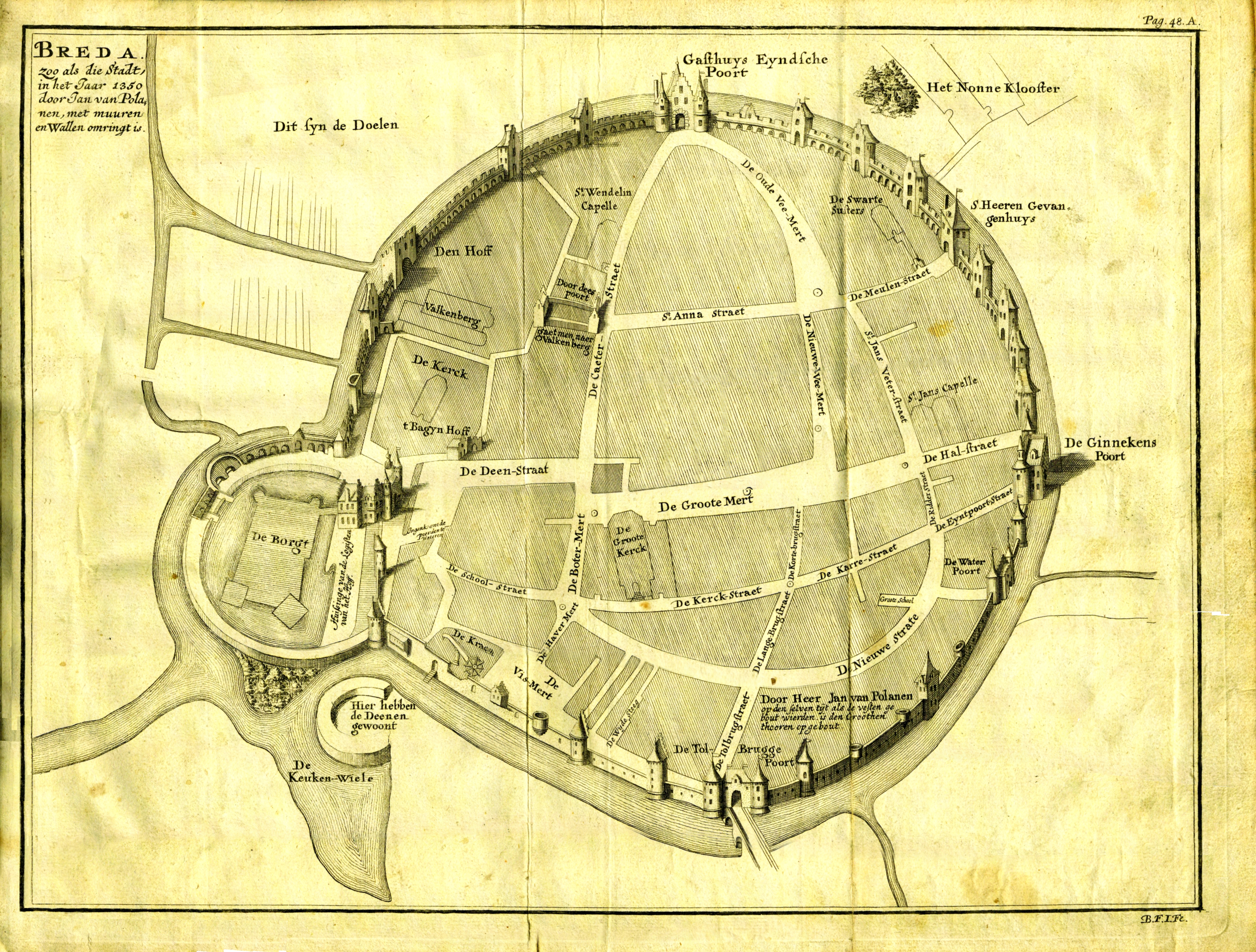 Breda zoals in 1350 - door Jan van Polanen - bevestigd met muren en wallen